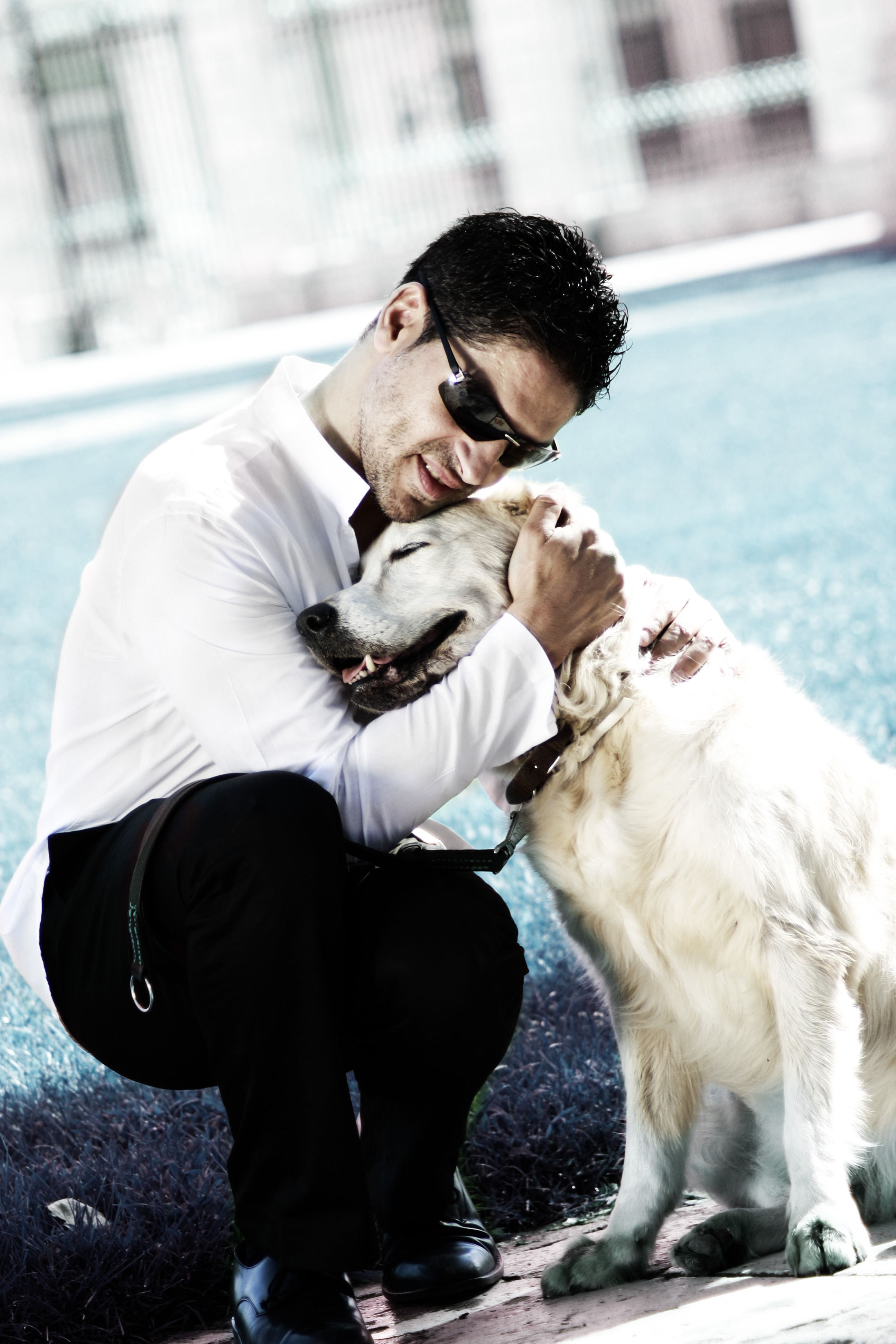 Serafín Zubiri y su perro Xifo.